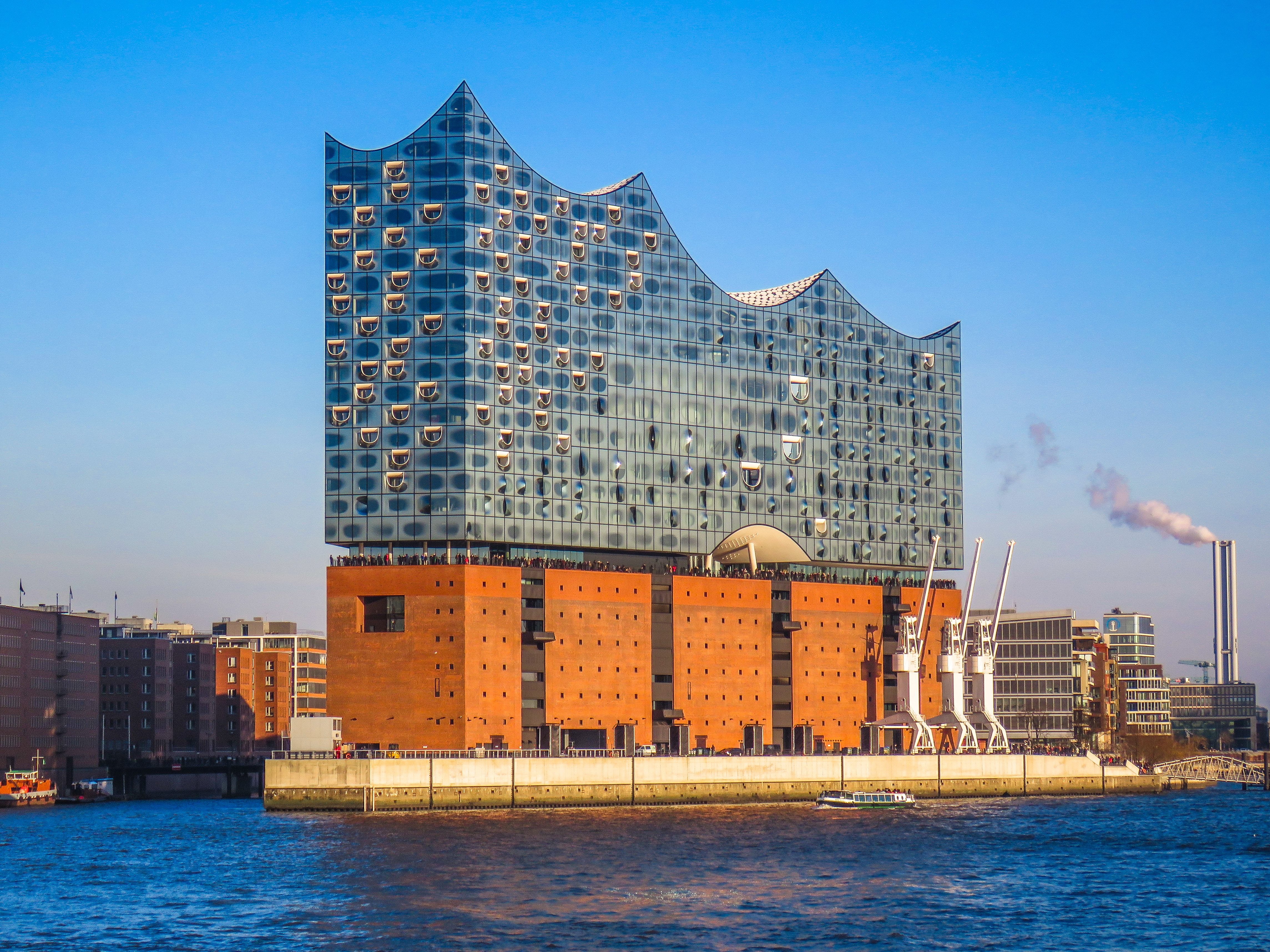 Elbphilharmonie, Blick von der Elbe